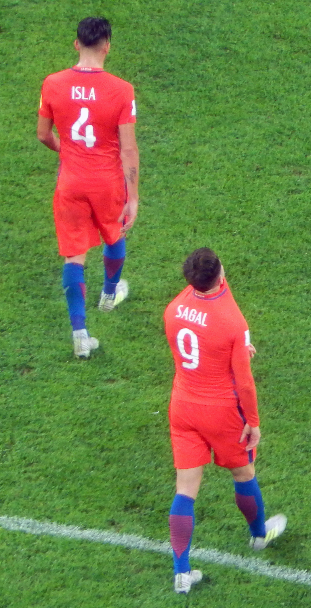 Финал Кубка конфедераций 2017